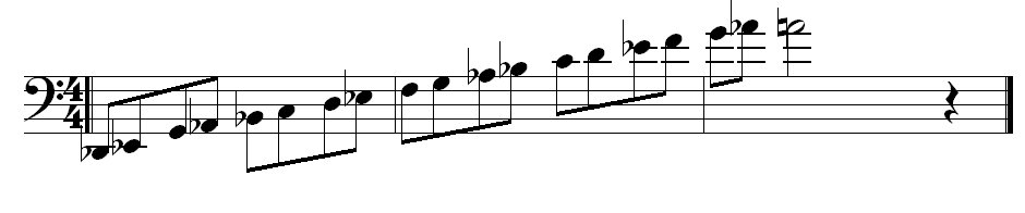 Baritone saxophone range, real(C diatonic scale)